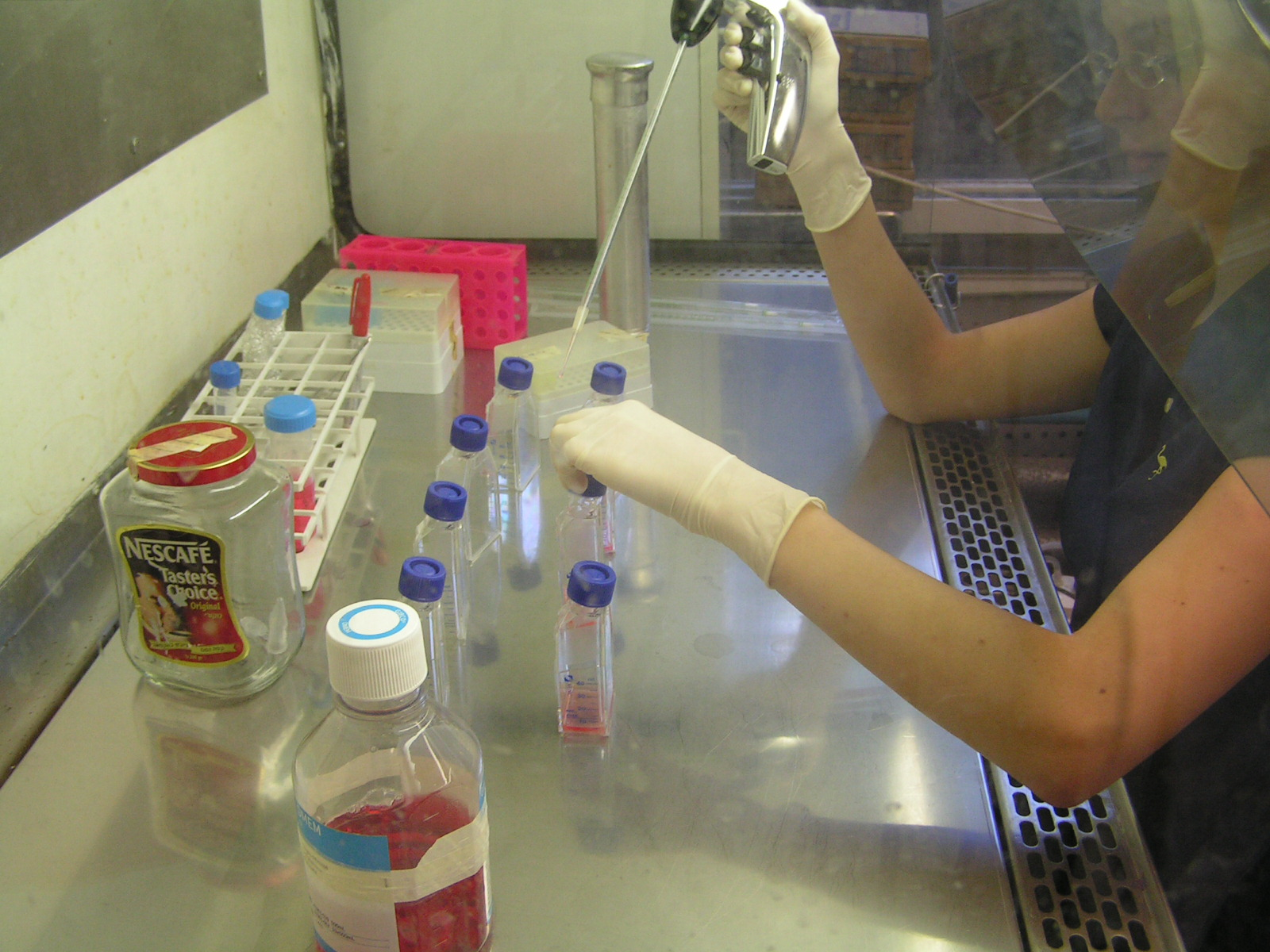 Biological hood for cell culture